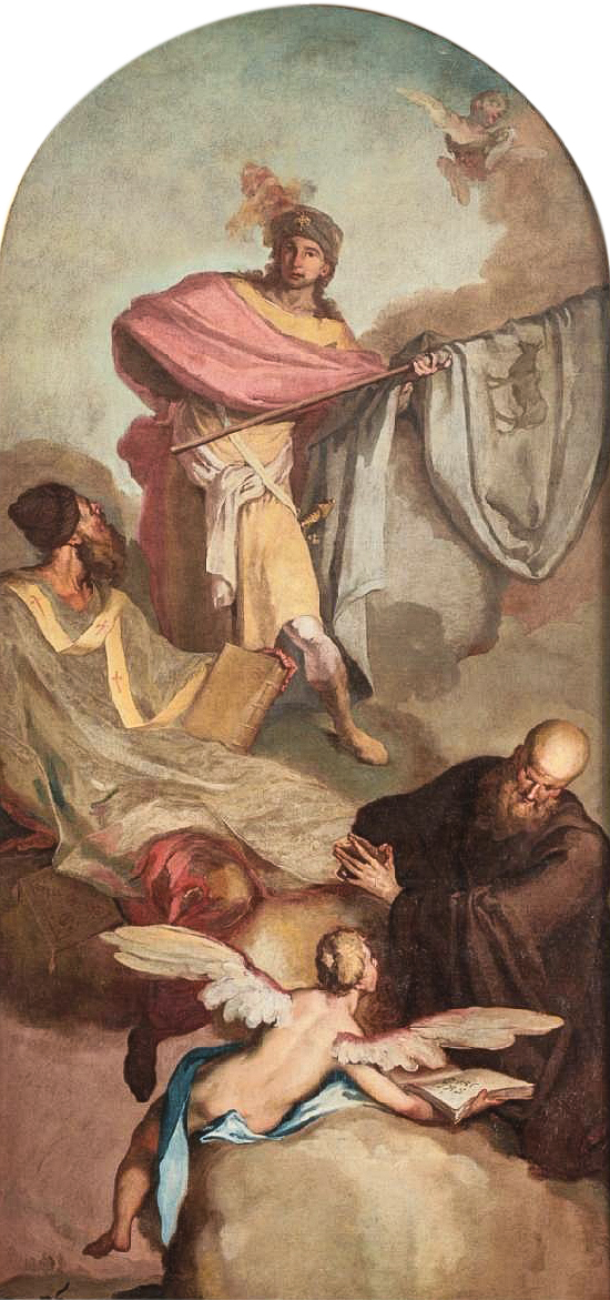 Mattia Bortoloni, pala dei Santi Bovo, Spiridione e Francesco di Paola, chiesa arcipretale di San Nicolò Vescovo, Castelguglielmo (RO)